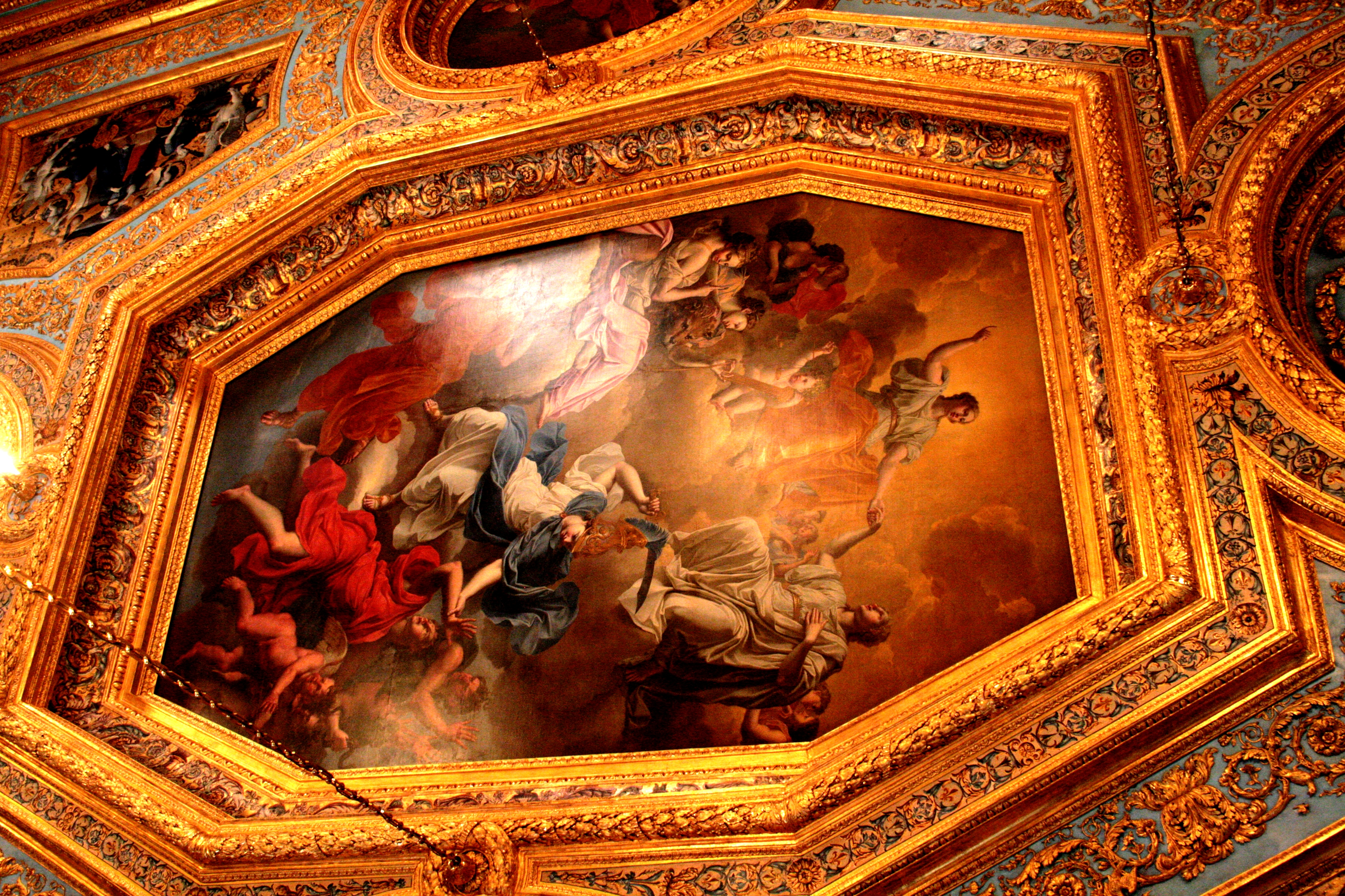 Parlement de Bretagne, Grand Chambre, Toile centrale de Noël Coypel